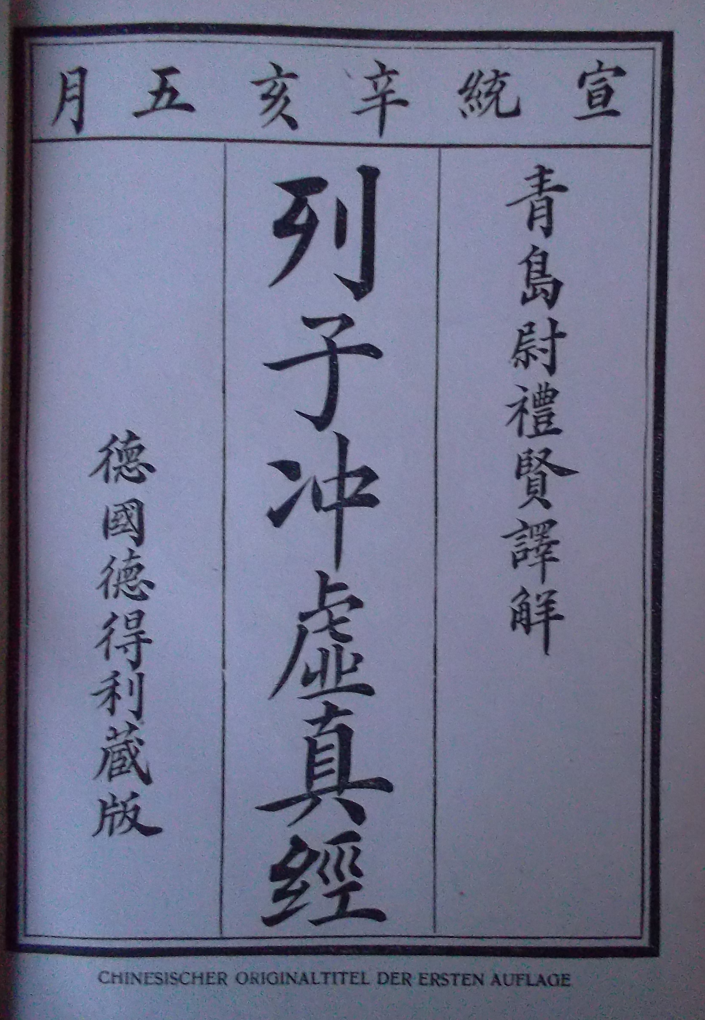 Liä Dsi, Das wahre Buch vom quellenden Urgrund, Tschung Hü Dschen Ging, Die Lehren der Philosophen Liä Yü Kou und Yang Dschu, Übersetzt von Richard Wilhelm, Eugen Diederichs Verlag, Jena, 1921